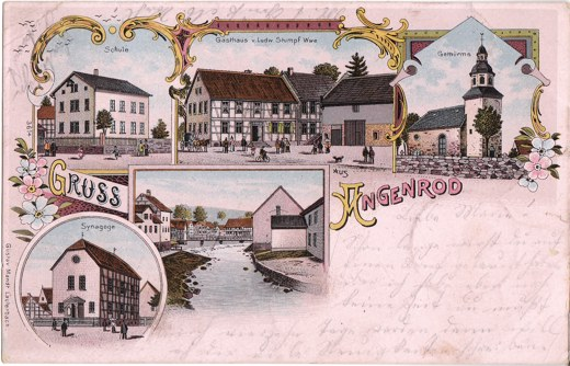 Ansichtskarte von Angenrod